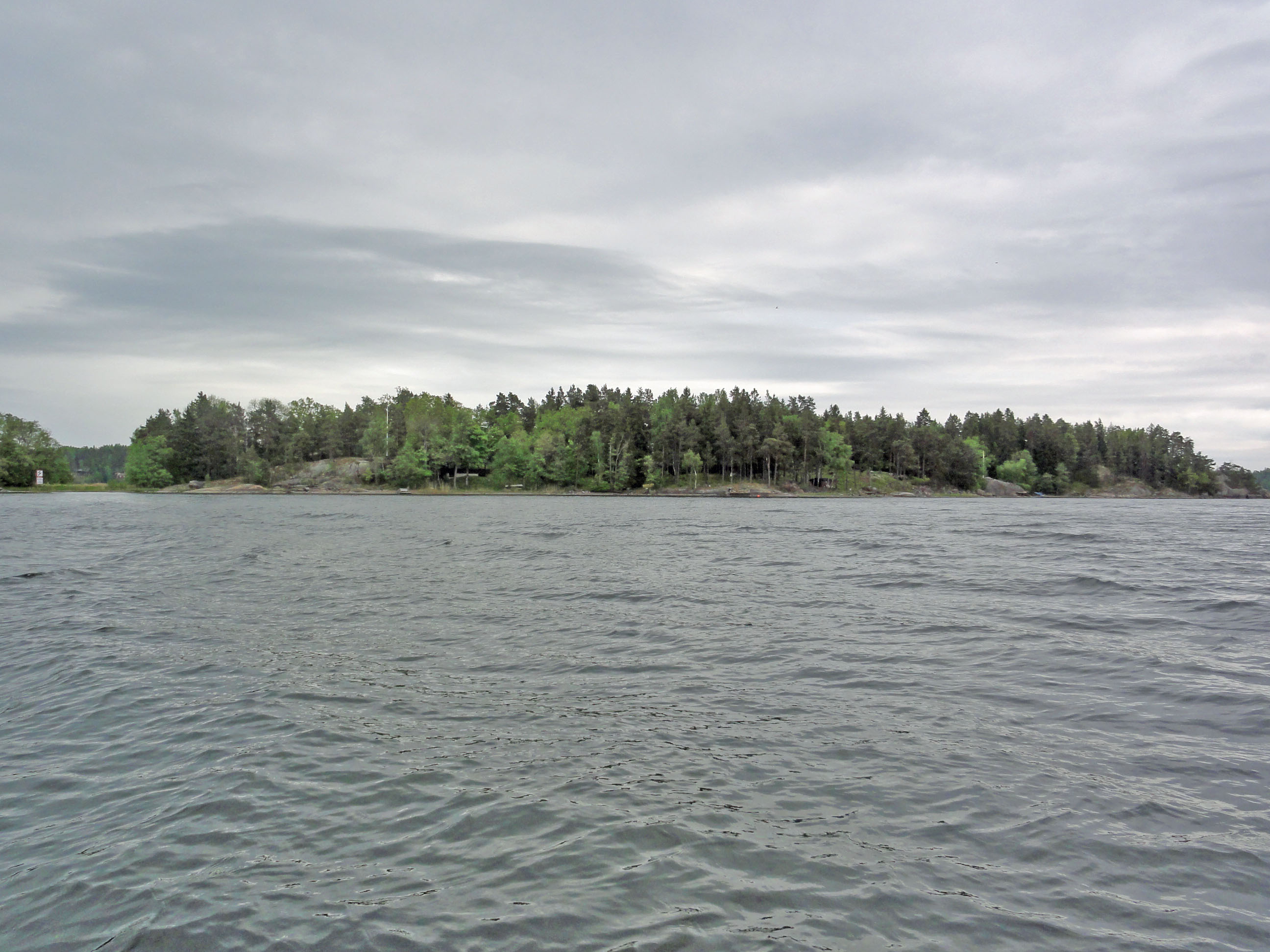 Danderholmens västra sida